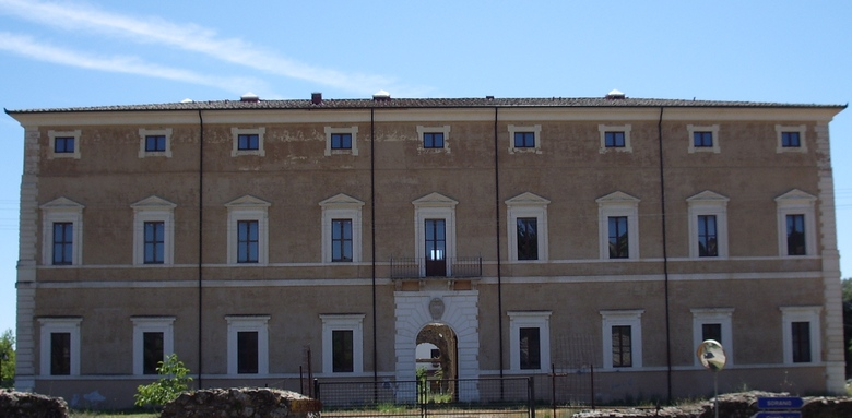 La Villa Sforzesca nei pressi di Castell'Azzara (GR), Tuscany (Italy)